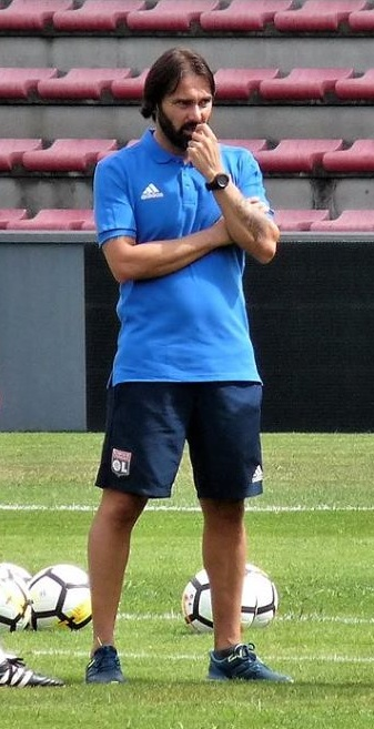 Reynald Pedros, entraîneur de L'olympique lyonnais féminin, lors de la préparation d'avant saison en août 2017 à Toulouse.